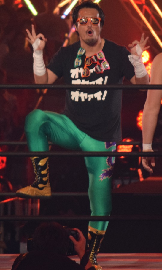 2015年11月7日 大阪府立体育会館 「POWER STRUGGLE」 田口隆祐